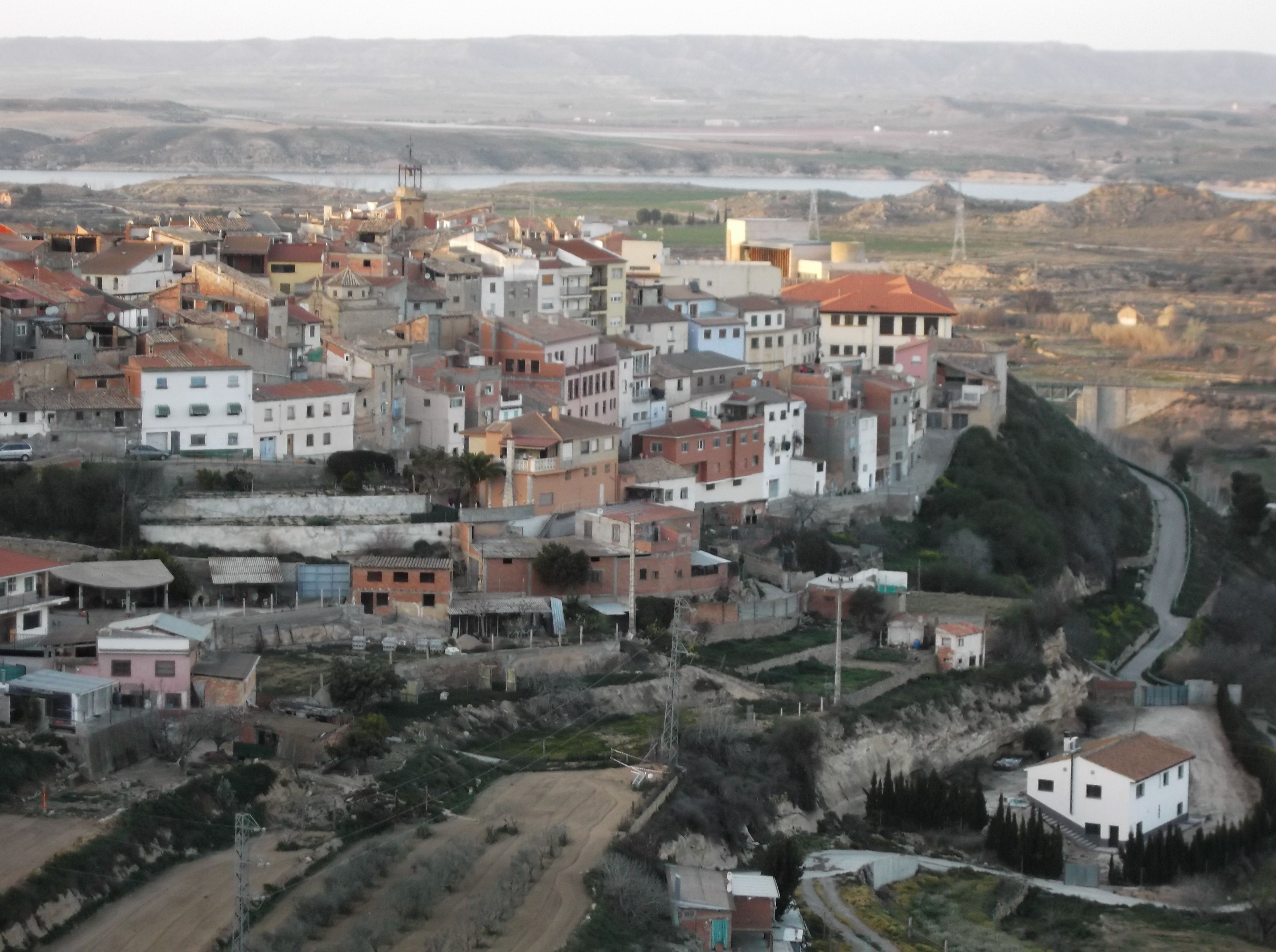 Panorámica de Caspe desde la ermita de Santa María de Horta